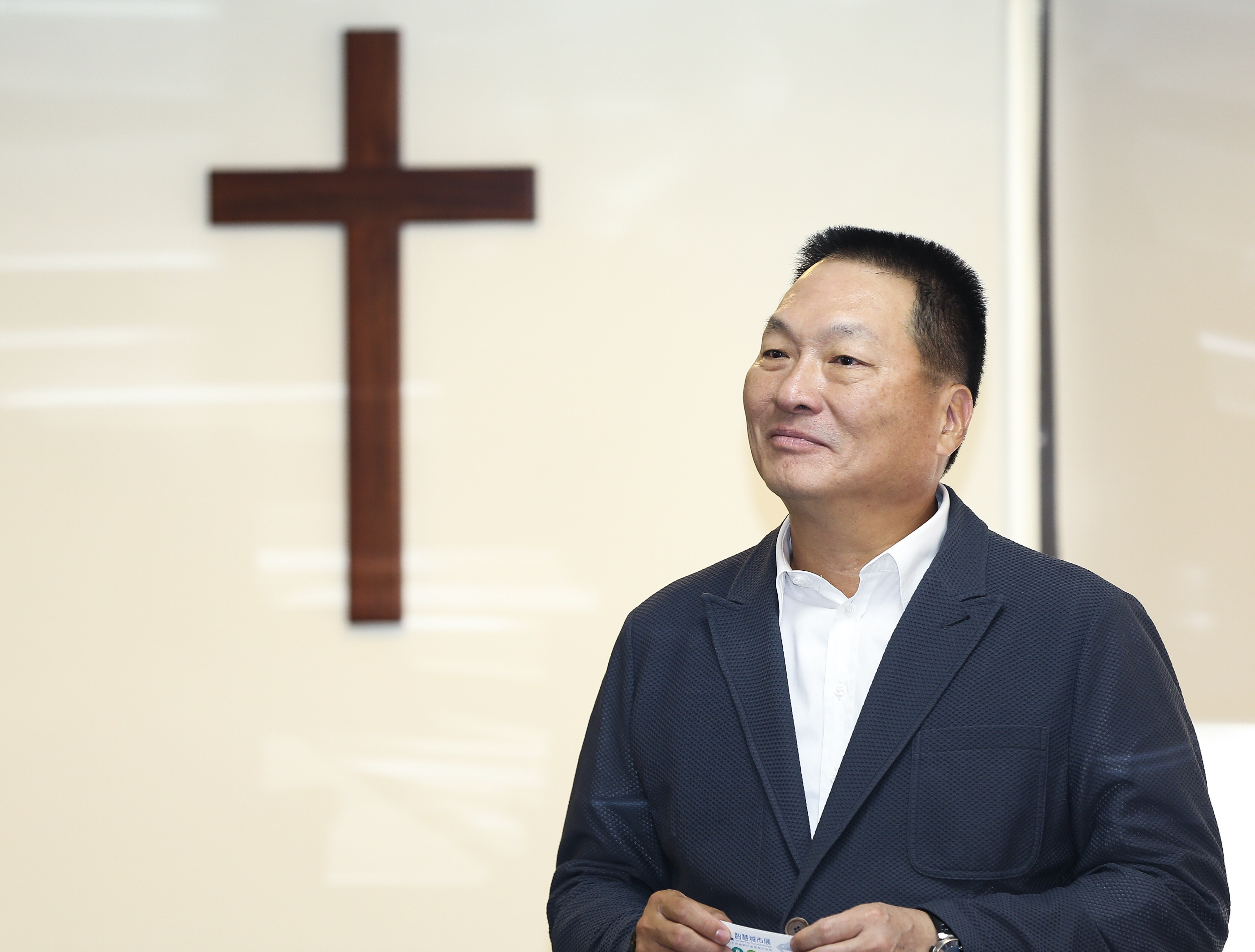 東森集團總裁王令麟